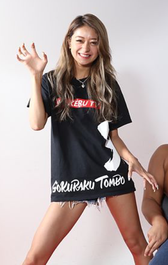 MIYU IKEDA